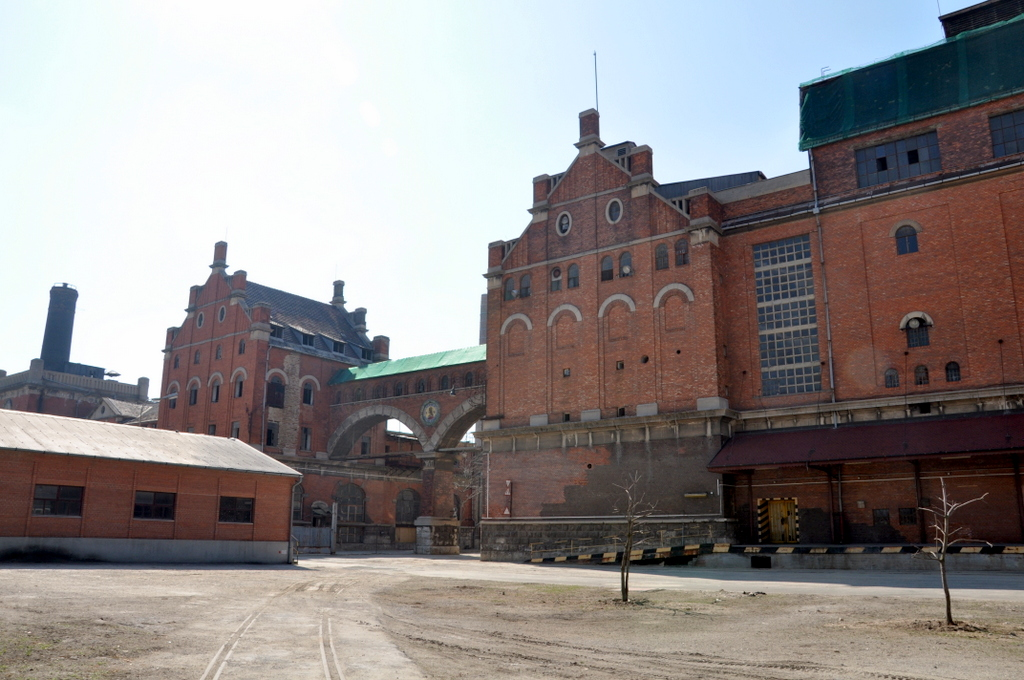 Former beer brewery, then Globus Cannery (now defunct) in Budapest District X